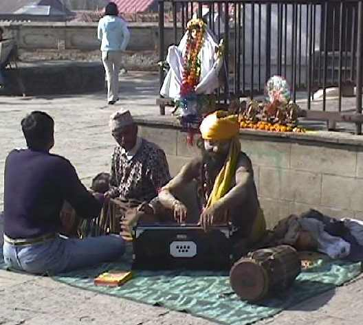 Йоги у храма ПашупатиЙоги у храма Пашупати в Непале